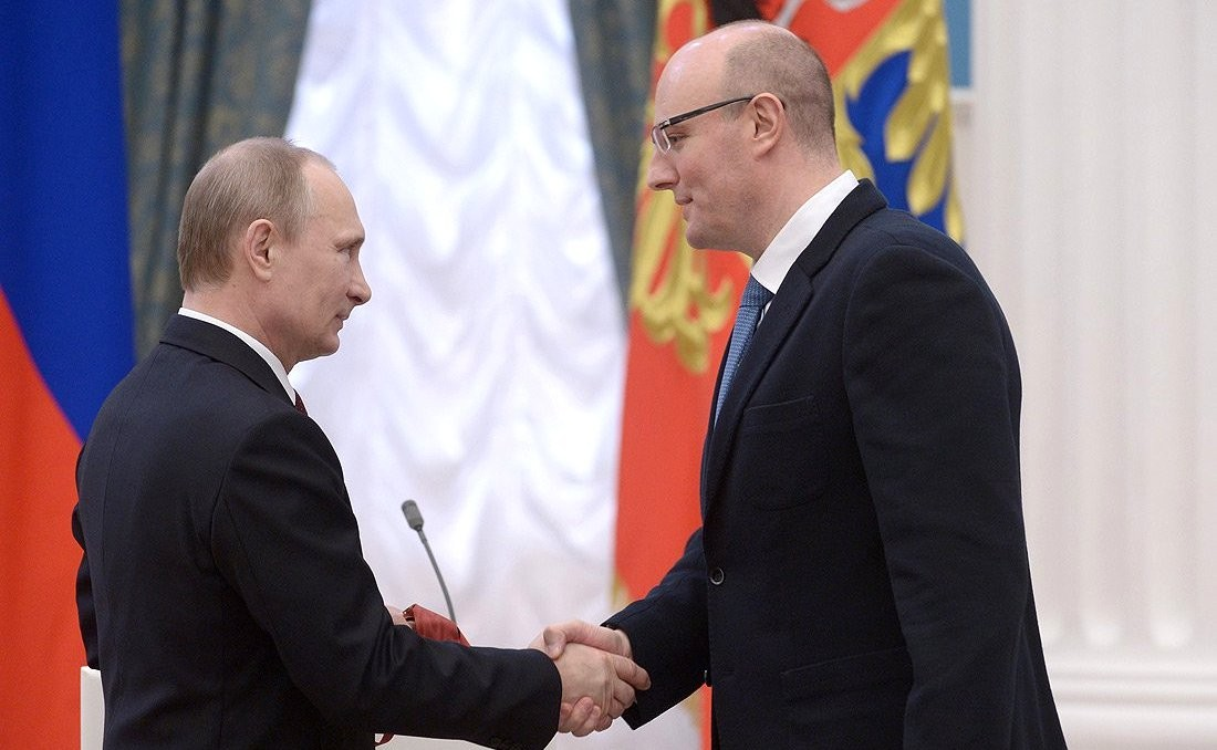 Вручение государственных наград Российской Федерации. Президент автономной некоммерческой организации «Организационный комитет «Сочи-2014» Дмитрий Чернышенко награждён орденом «За заслуги перед Отечеством» II cтепени.